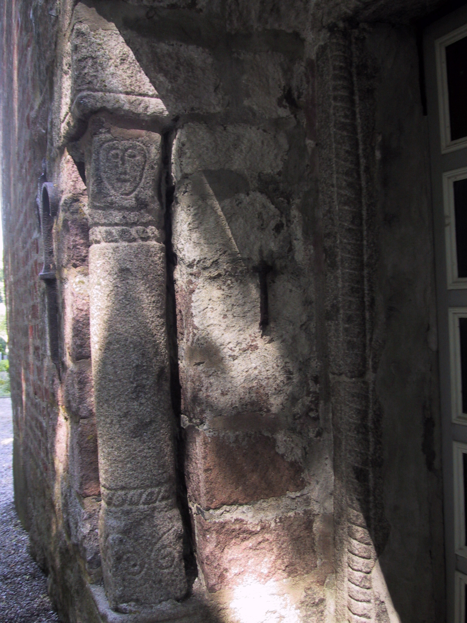 Das Westportal der Marienkirche in Grundhof, mit Fratzensäule